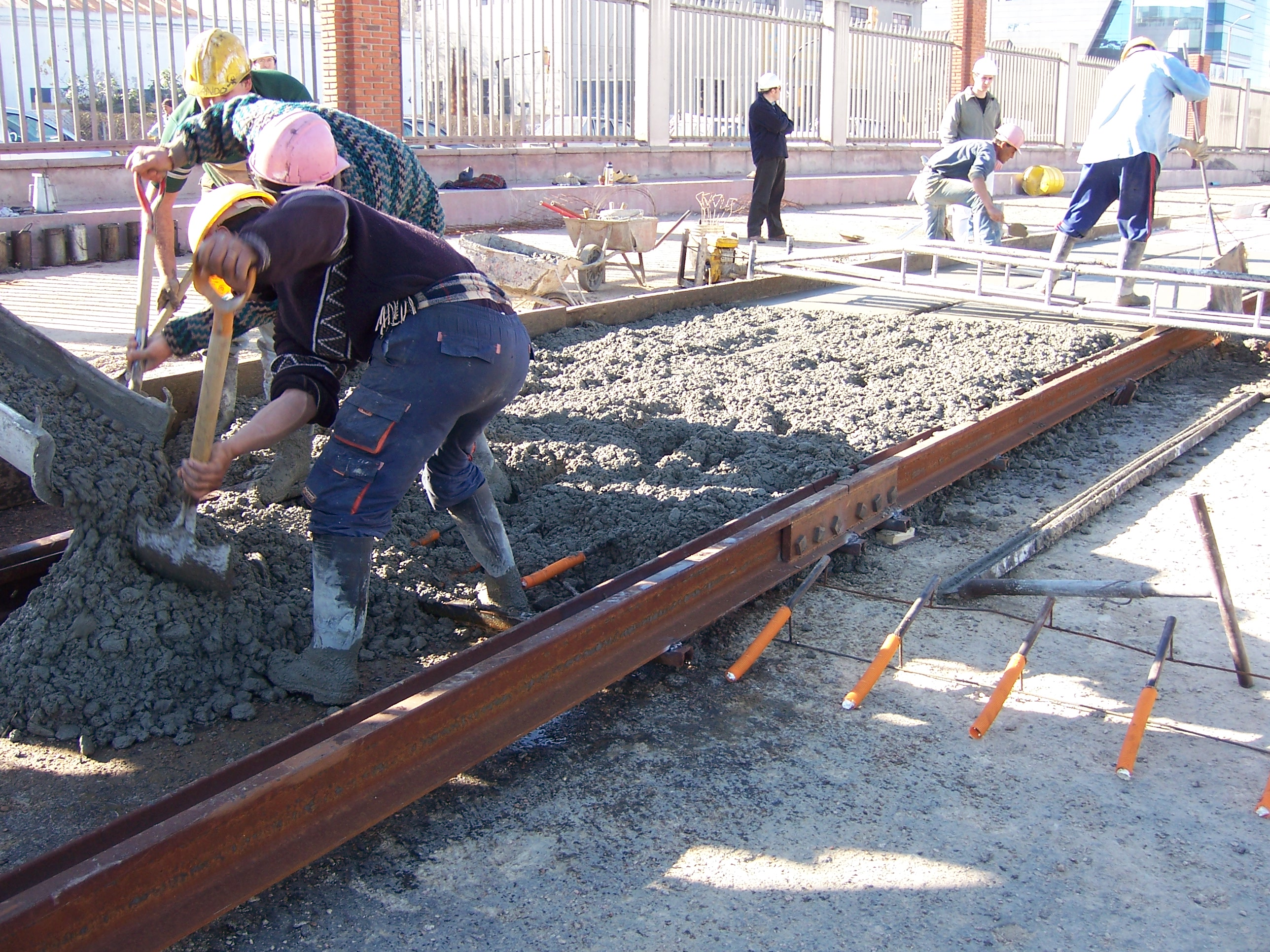 Puesta en obra del hormigón.